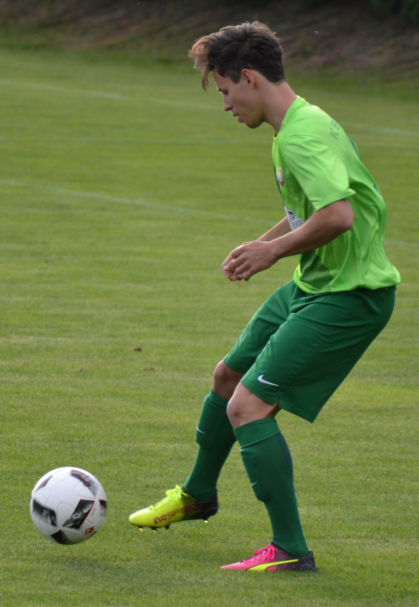 Clemens Fandrich beim Freundschaftsspiel von Erzgebirge Aue gegen den HFC Colditz im Juni 2016